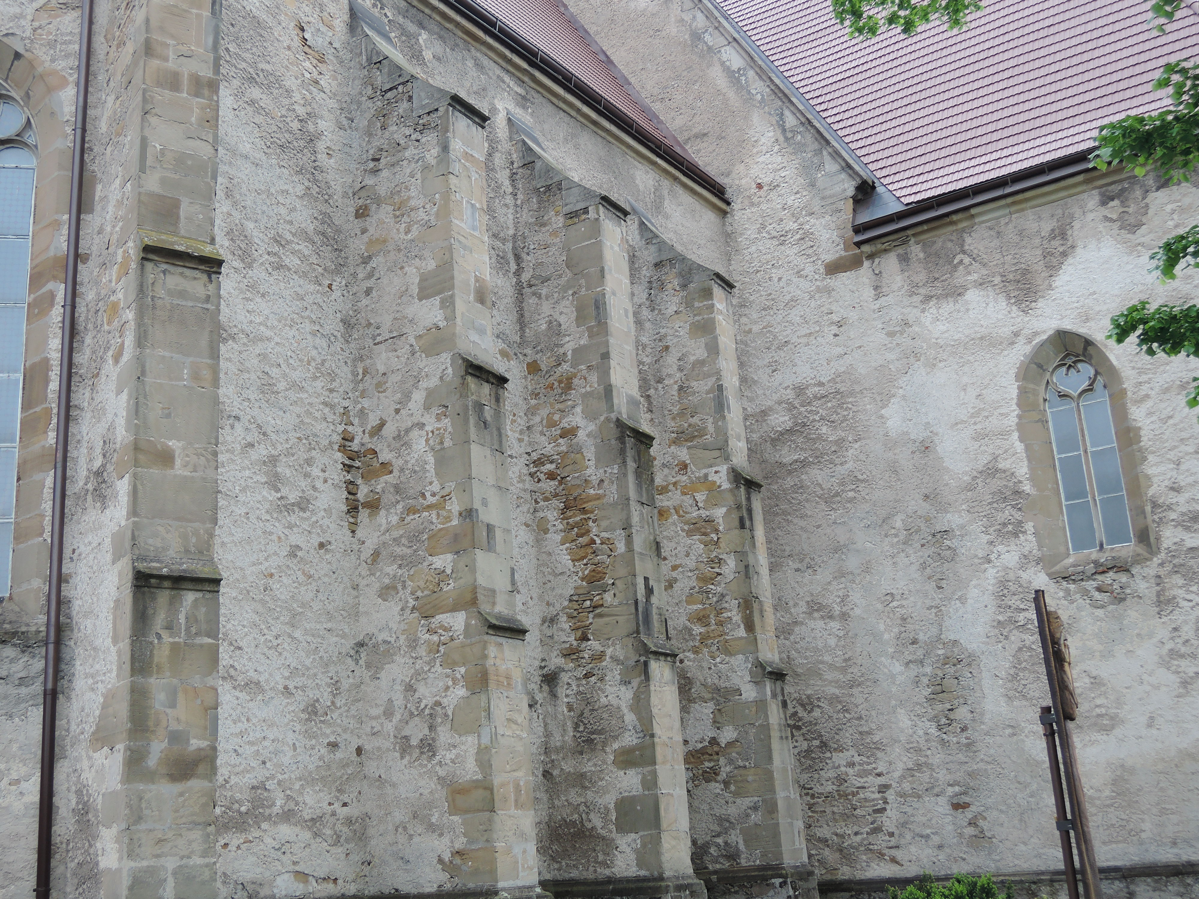 oporné piliere